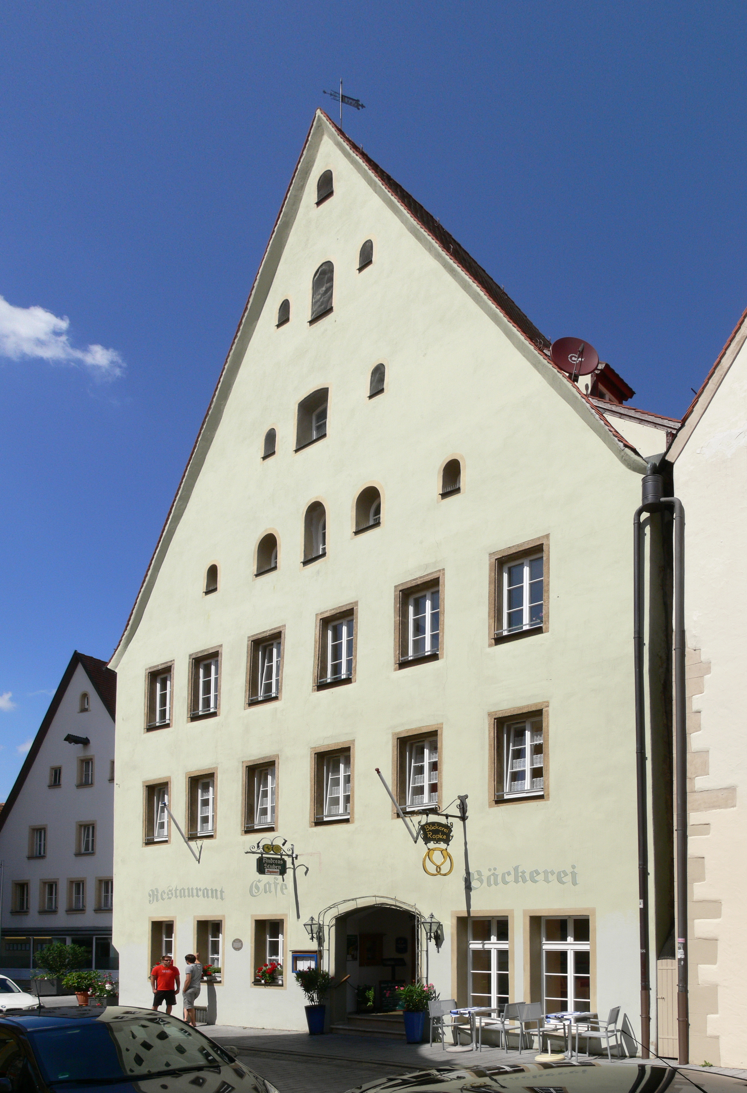 Denkmalgeschütztes Gebäude in Weißenburg (Bayern), Rosenstraße 18, Bürgerhaus